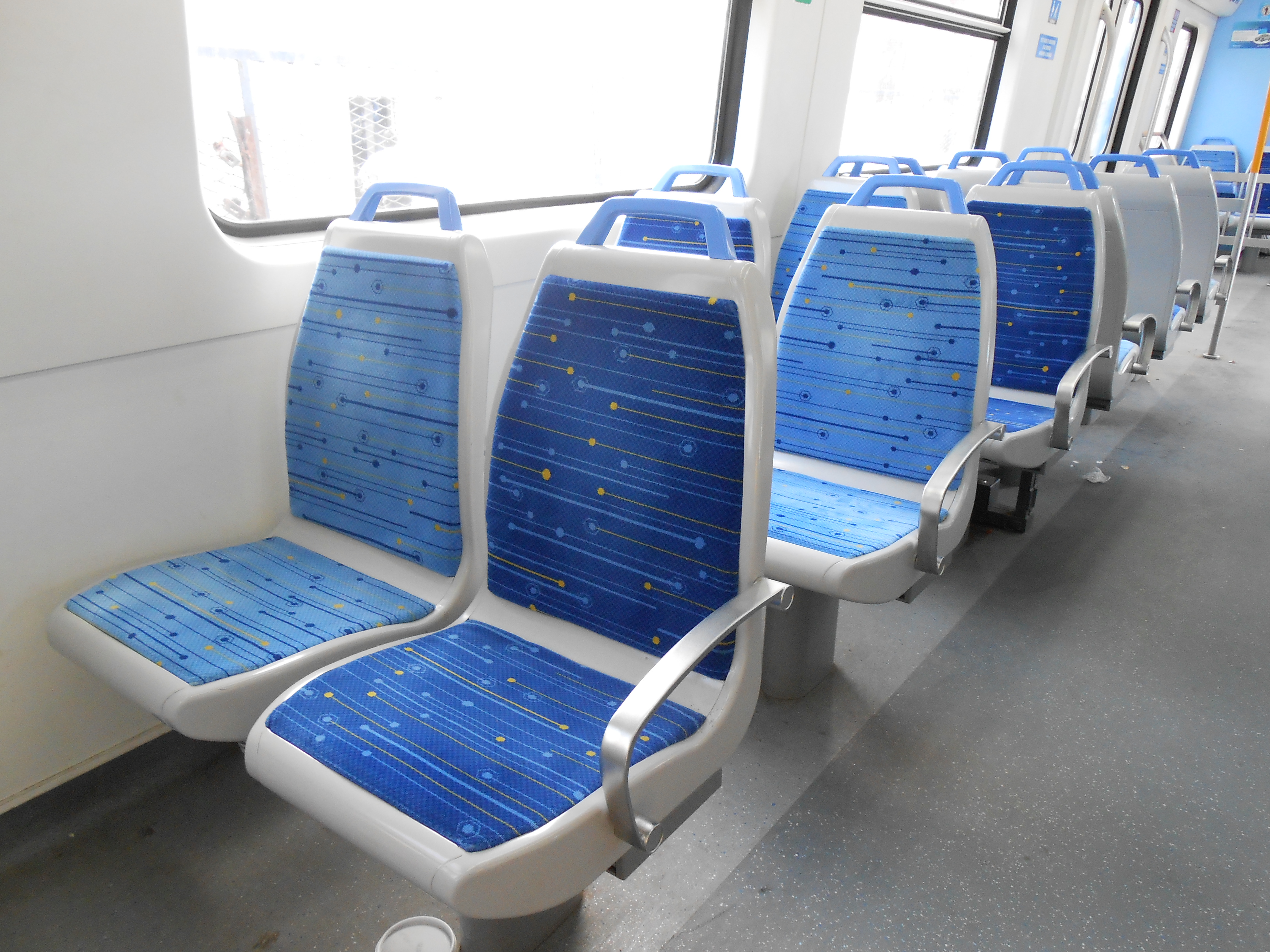 Primer plano de los asientos del tren eléctrico múltiple múltiple CSR que opera en los ramales Mitre y Sarmiento de la empresa Trenes Argentinos. GBA, Argentina